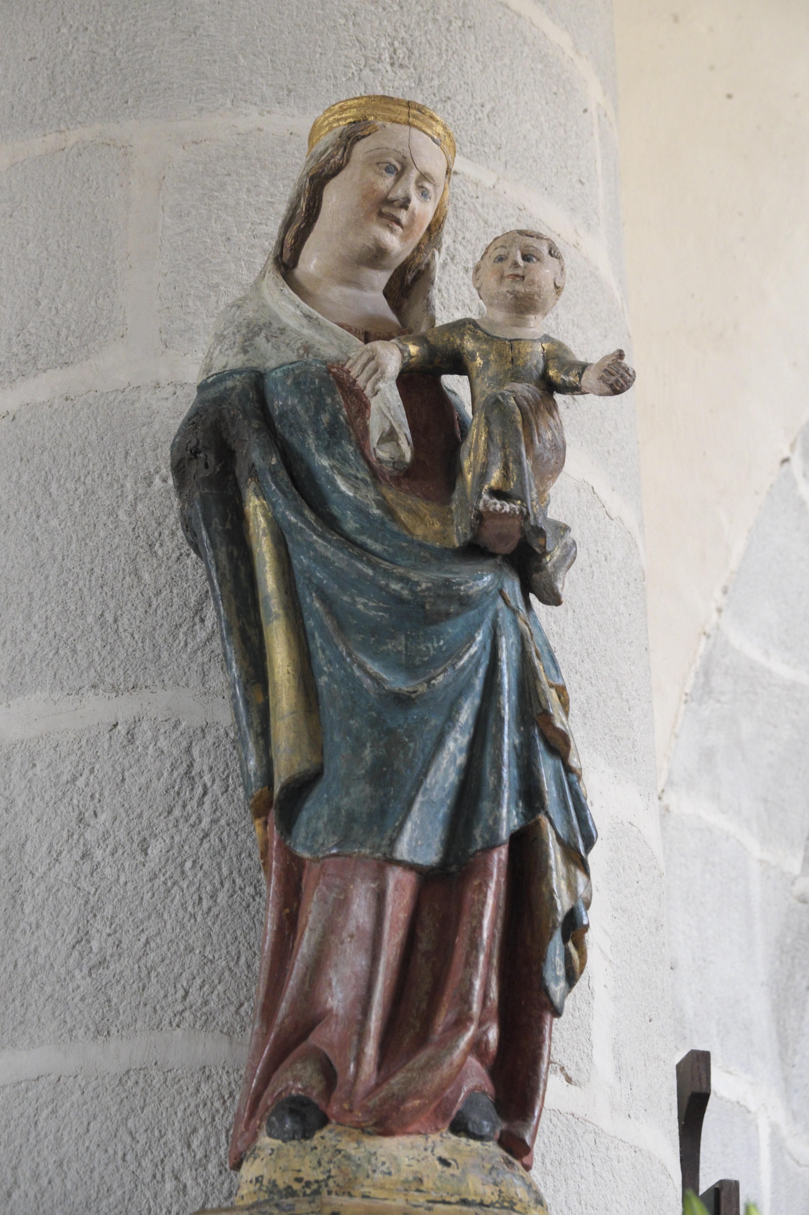 Katholische Pfarrkirche Notre-Dame-de-Croaz-Batz in Roscoff im Département Finistère (Region Bretagne/Frankreich), Madonna mit Kind